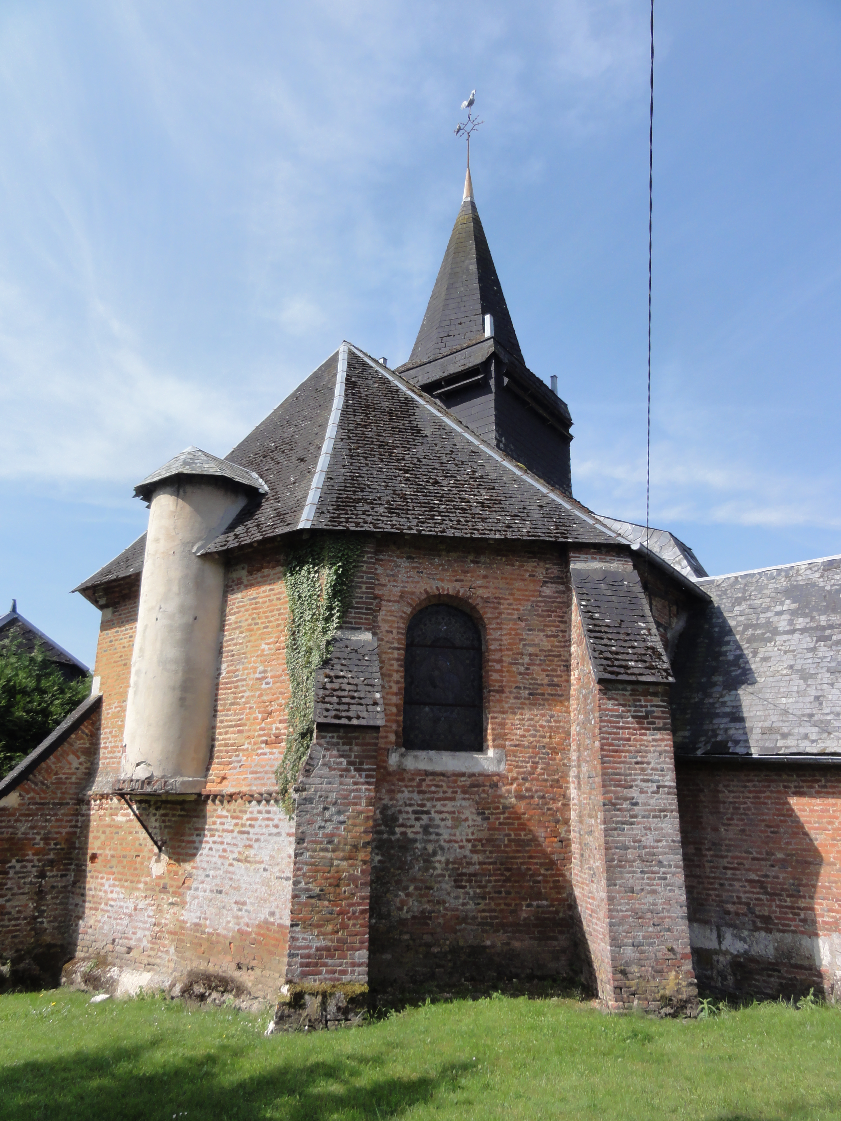 Les Autels (Aisne) église, chevet